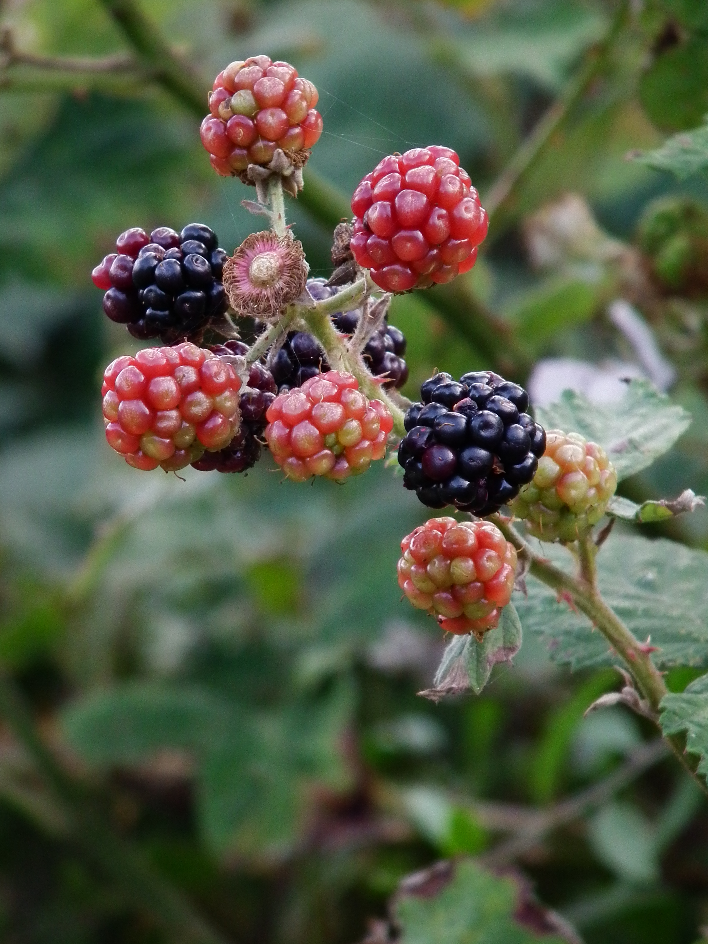 Reifestadien von Brombeerfrüchten (Rubus), fotografiert auf der ostfriesischen Nordseeinsel Juist (Niedersachsen, Deutschland)